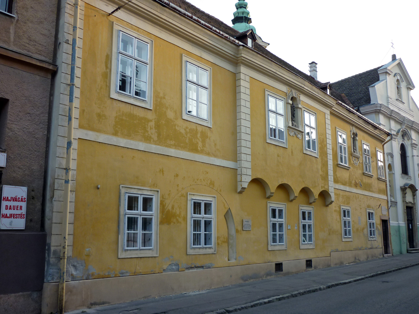 Magyar ispita (Győr, Rákóczi Ferenc út 6., Teleki László utca sarok) This is a photo of a monument in Hungary, Identifier: 4344